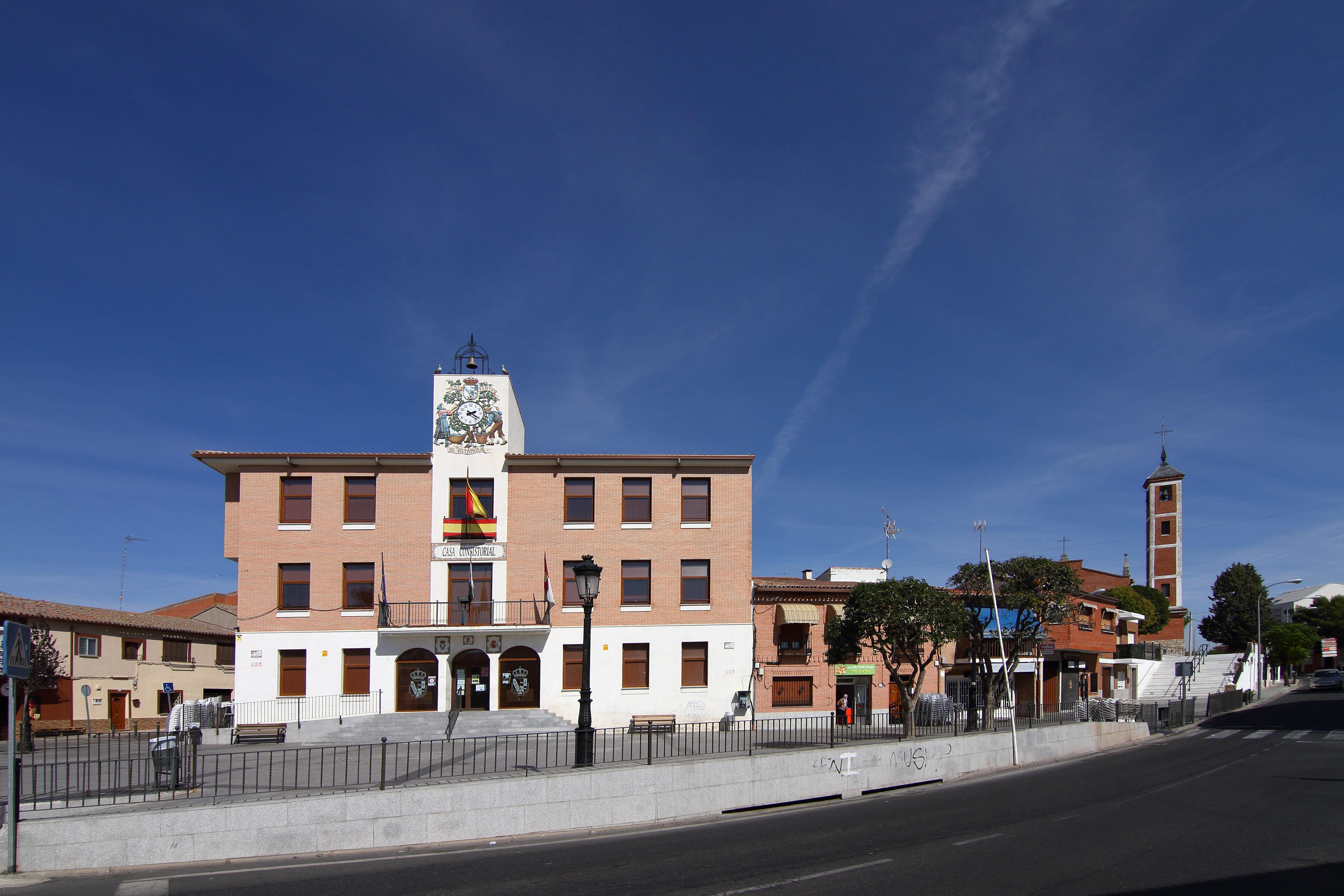 Plaza de la Constitución en Las Ventas de Retamosa